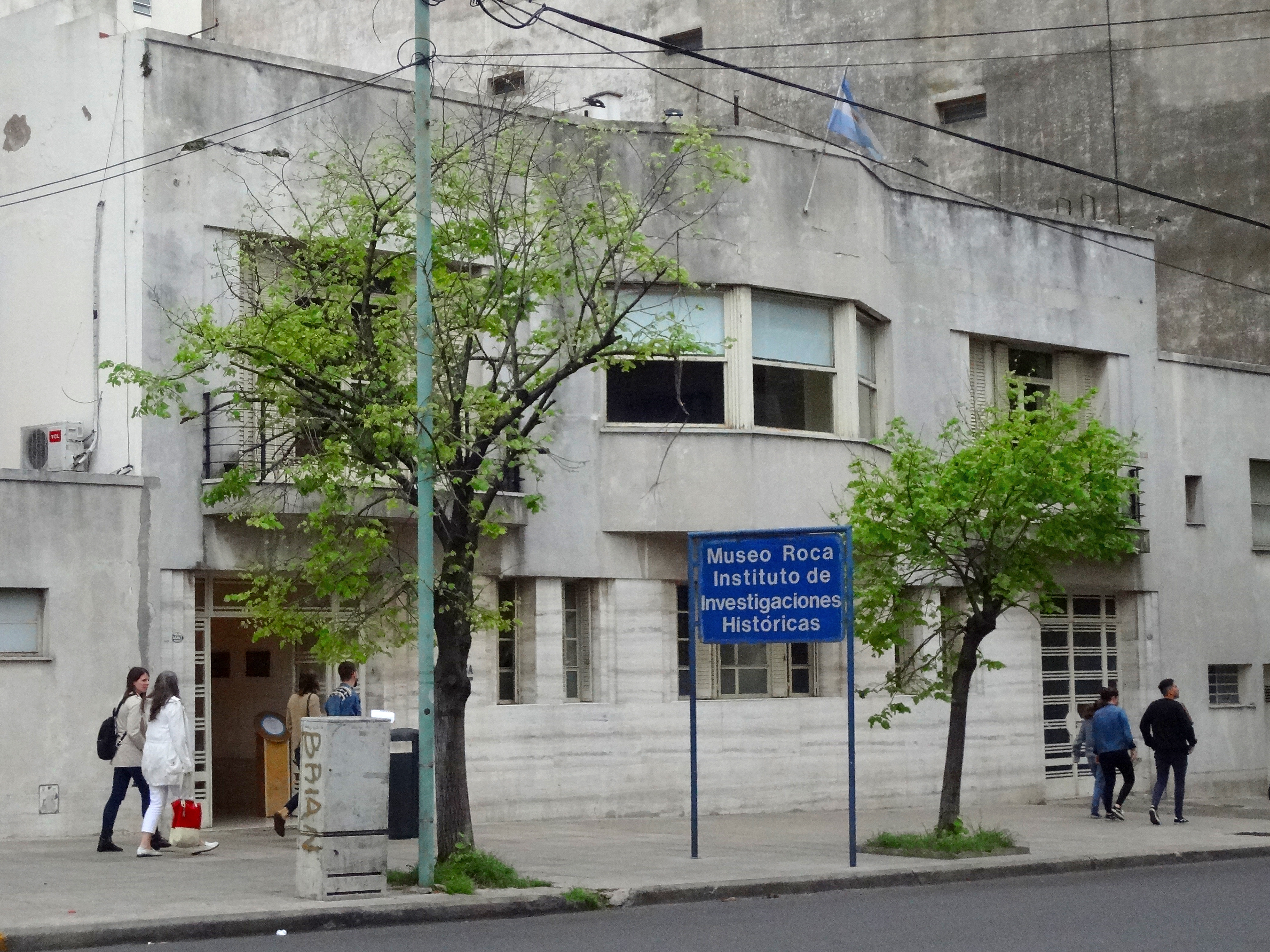 Museo Roca - Buenos Aires - Argentina.